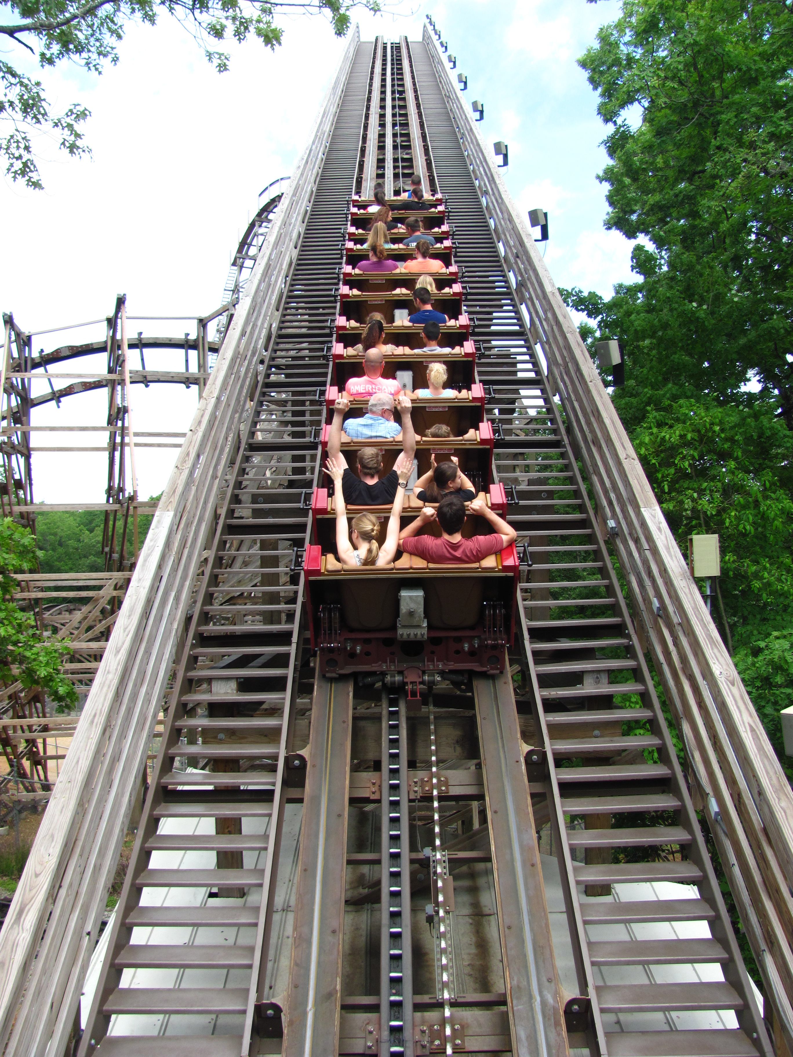 Outlaw Run